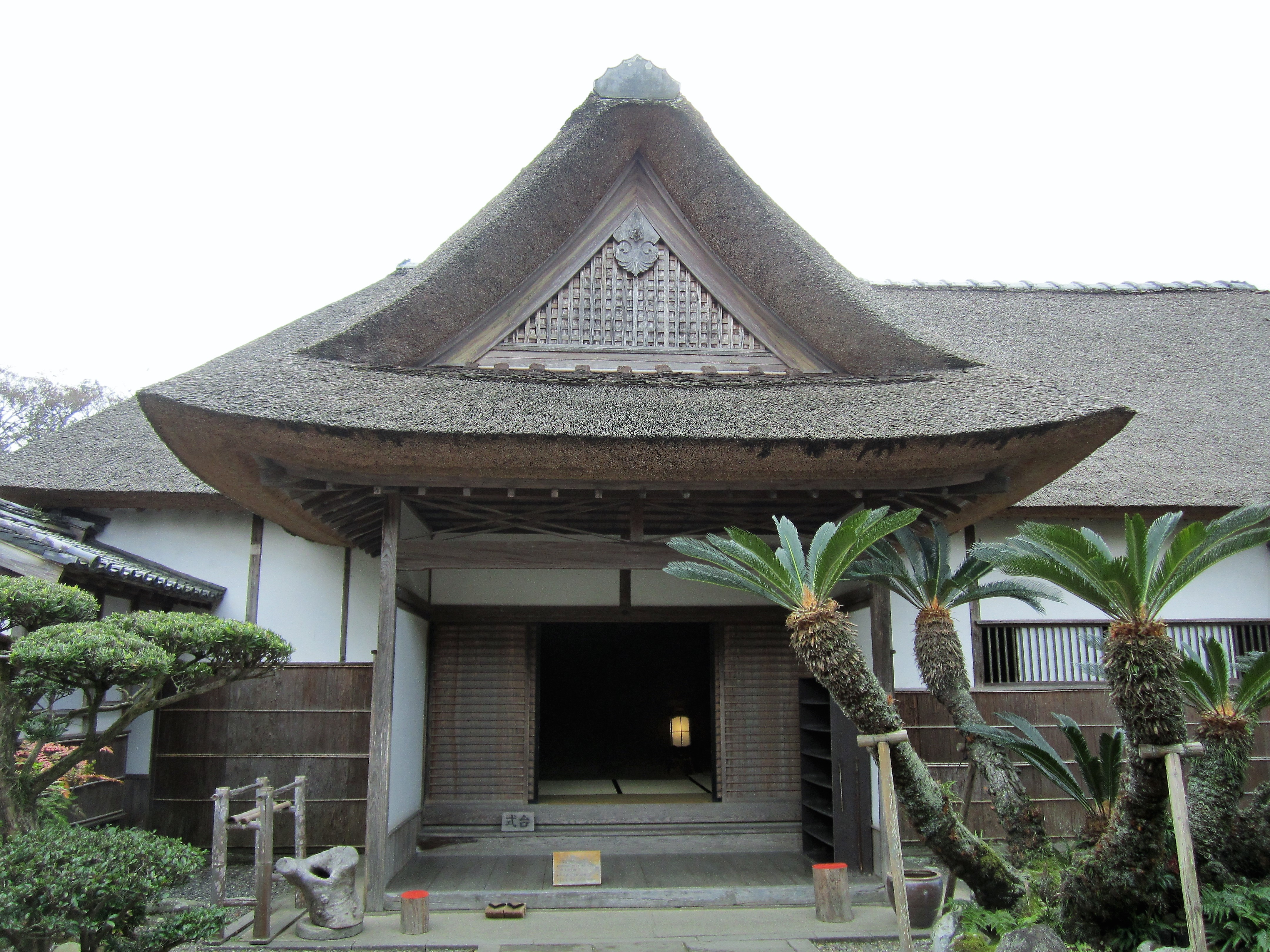 大原邸（北台地区） Canon PowerShot A2200